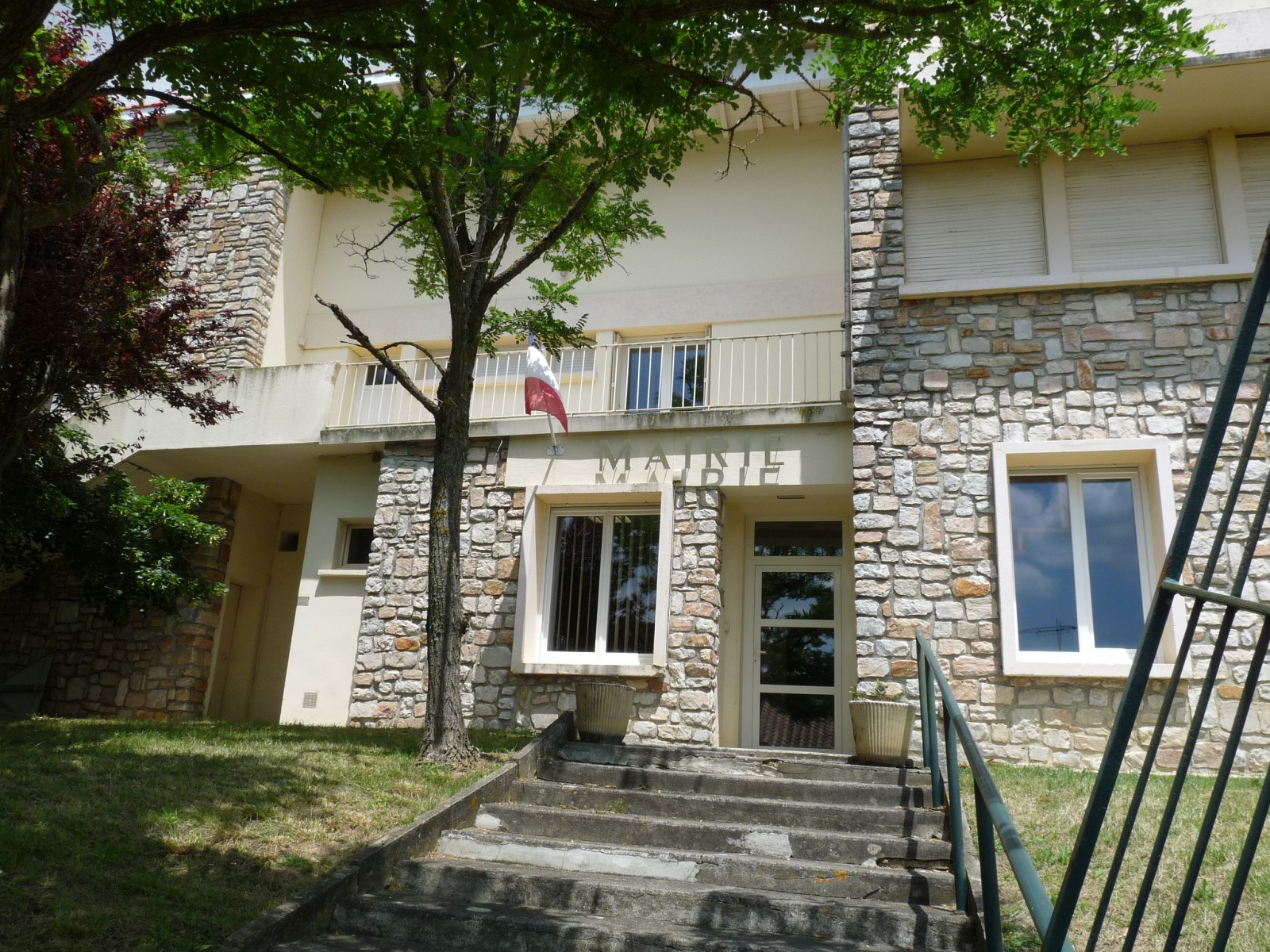 Mairie de Ségreville, Haute-Garonne, France